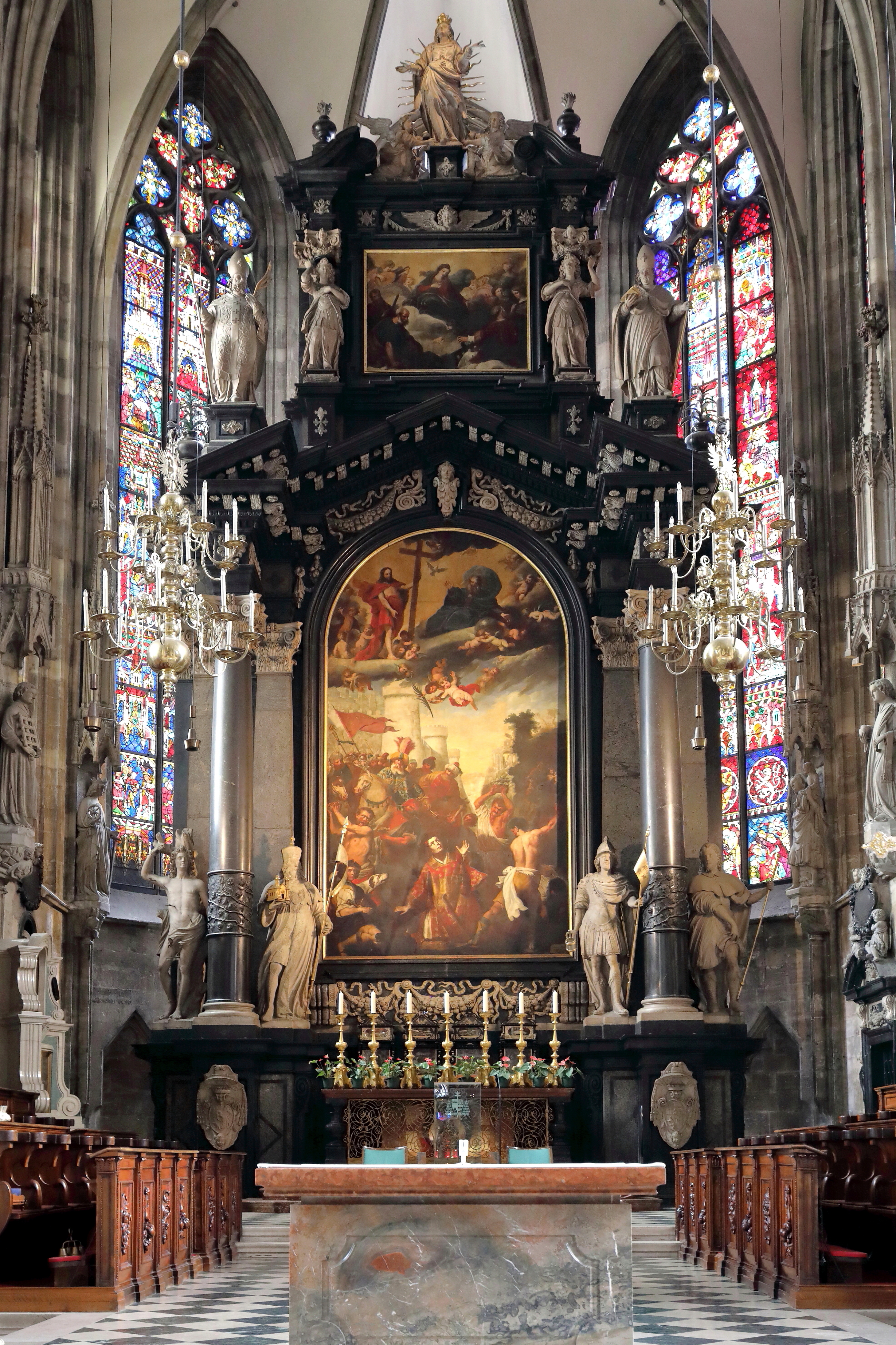 Hochaltar des Stephansdoms in der österreichischen Bundeshauptstadt Wien.Das frühbarocke Meisterwerk aus Marmor und Stein wurde im Auftrag von Fürstbischof Philipp Friedrich Graf Breuner von Johann Jacob Pock, Steinmetzmeister, Bildhauer und Architekt errichtet und am 19. Mai 1647 konsekriert. Sein Bruder Tobias Pock malte das etwa 10 Meter hohe Altarbild. Es zeigt die Steinigung des hl. Stephanus vor den Mauern Jerusalems und über ihm den geöffneten Himmel mit Gott Vater und zu seiner Rechten Christus. Das Bild wurde auf Zinnplatten gemalt, weil man Sorge hatte, dass eine Leinwand die Größe des Bildes nicht tragen kann.